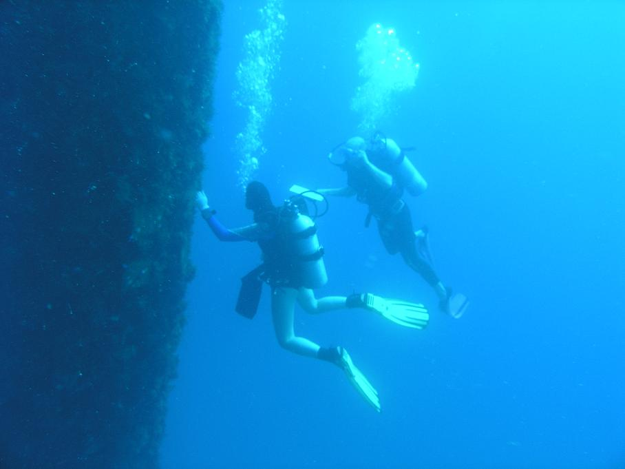 אם את/ה מעוניין לעשות שימוש בתמונה, אזי את הקרדיט העניקו לאסף זבולוני, אוניברסיטת תל אביב. תמונה זו הועלתה לוויקיפדיה ברשות על ידי משתמש:צ'כלברה.